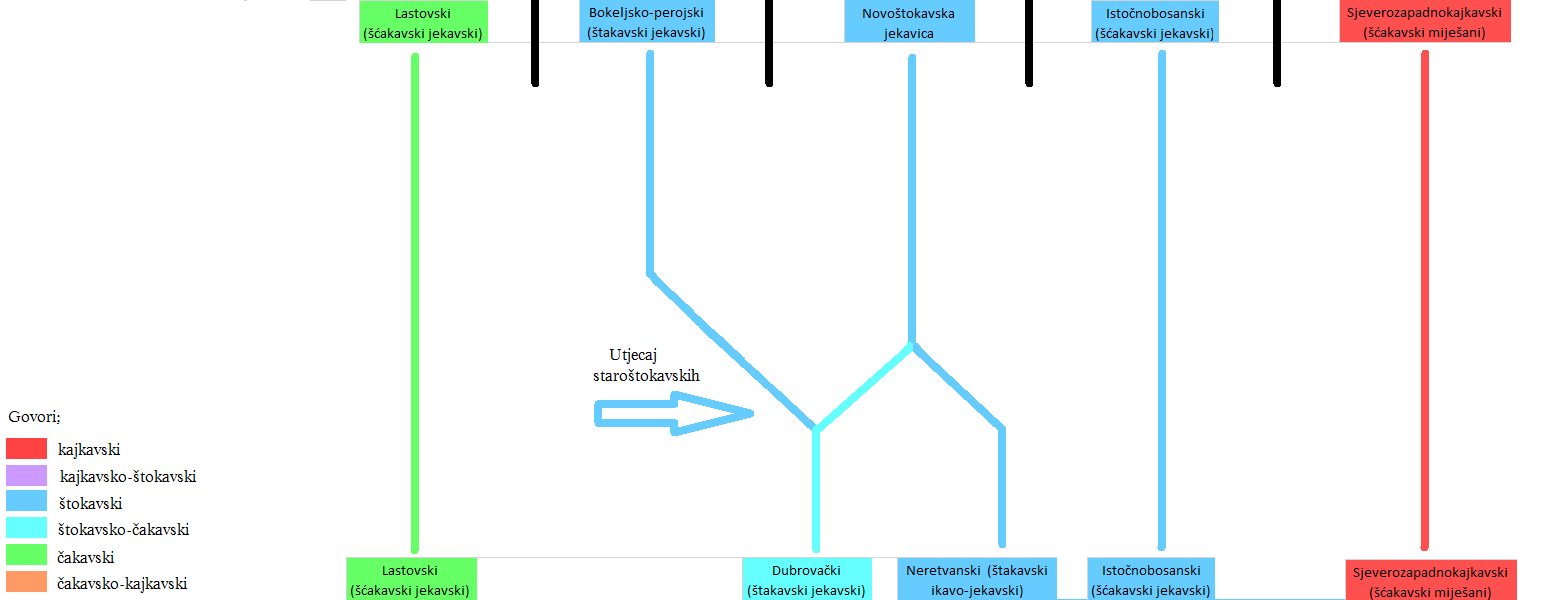 Struktura i razvoj jekavskih govora/dijalekata u Hrvata